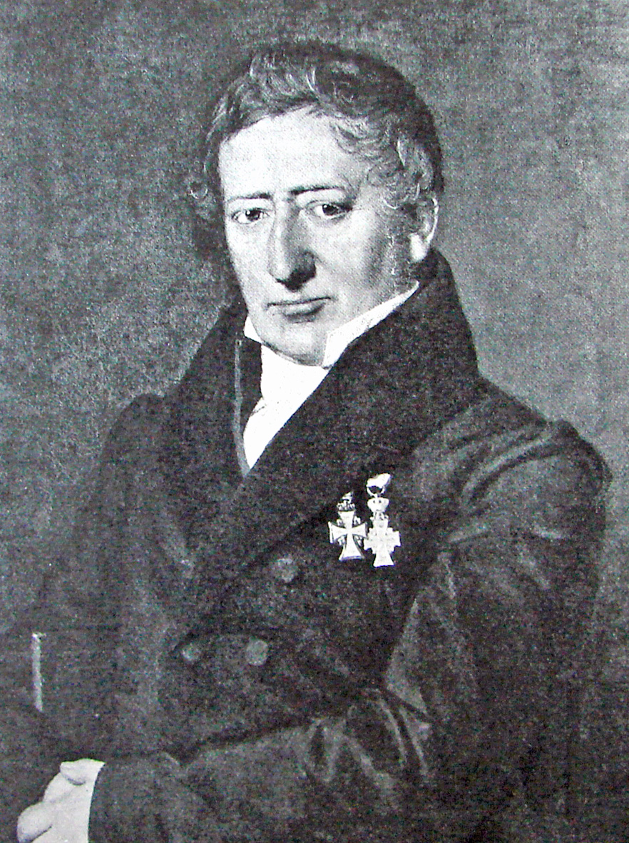 Jonas Collin (6. januar 1776 – 28. august 1861) var en dansk cand.jur. og gehejmekonferensråd. Han var en indflydelsesrig embedsmand i enevældens sidste årtier.